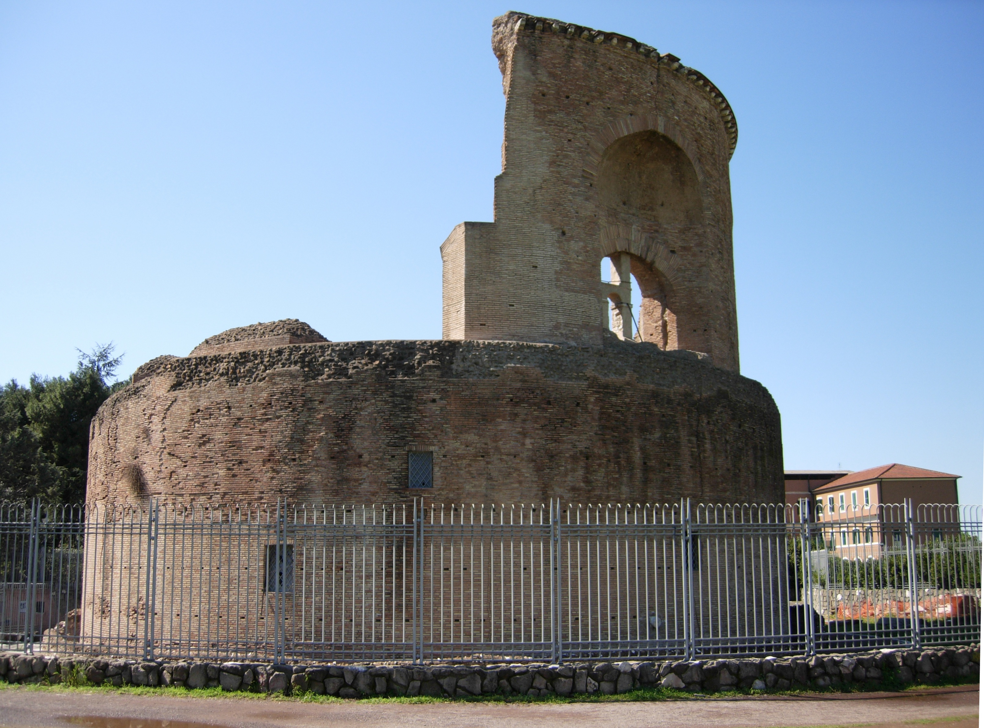 Roma - Villa de Sanctis - Mausoleo di Sant'Elena